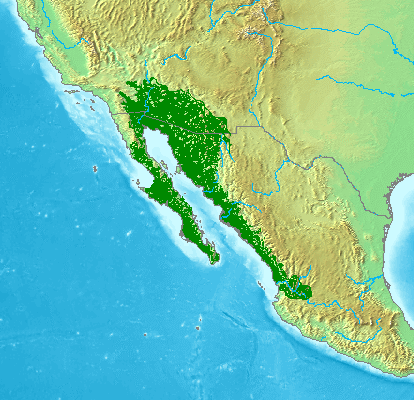 Range Map Melanerpes uropygialis